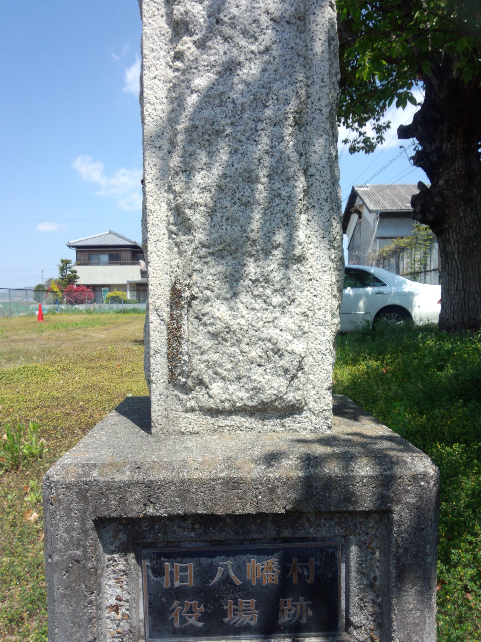 旧八幡村役場跡